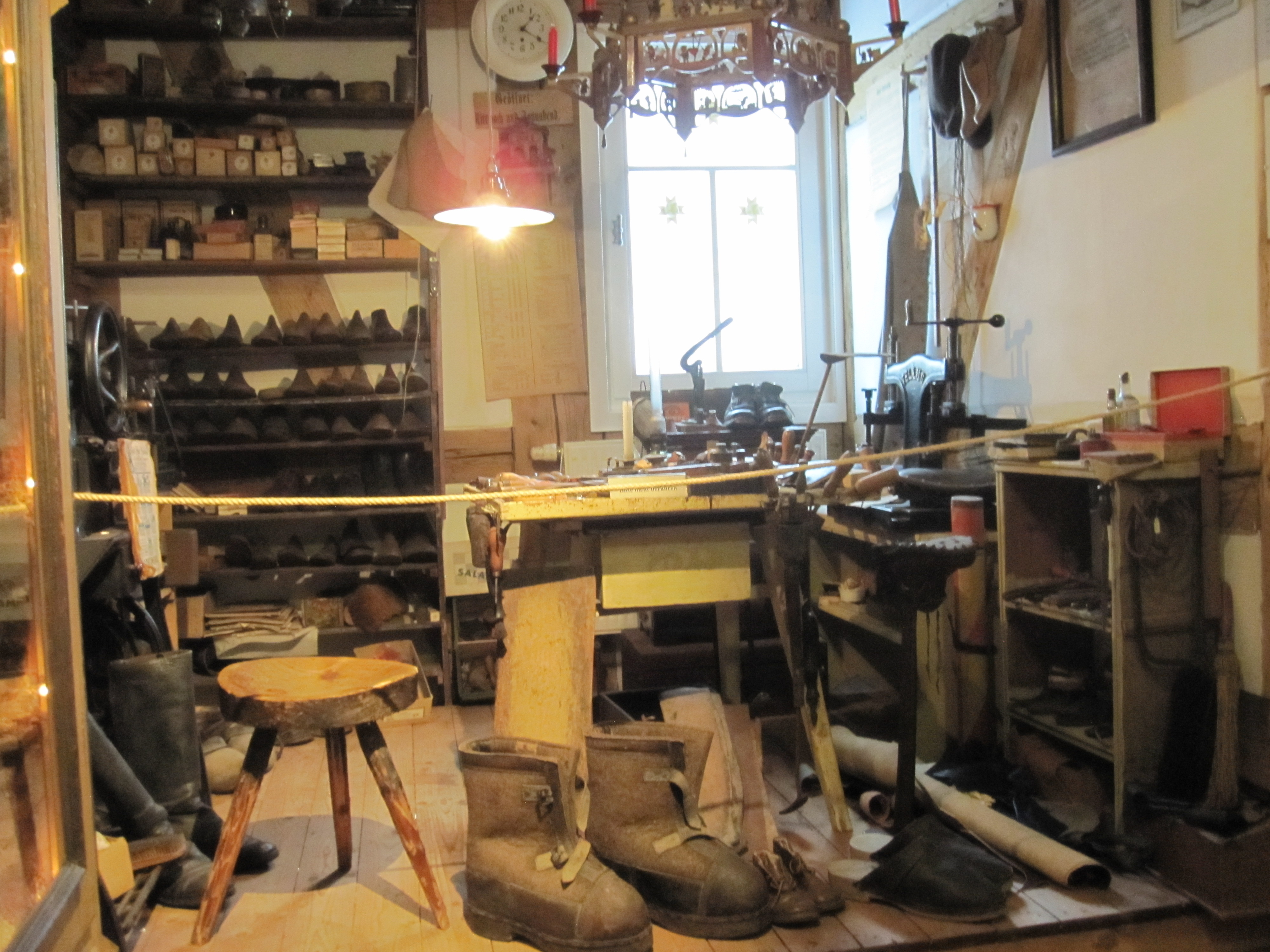 Bürsten- und Heimatmuseum Schönheide: Die Werkstatt des Schuhmachermeisters Kurt Petzold, der Jahrzehnte in Schönheide wirkte, ist in einem Raum des Museums ausgestellt. Es fallen die großen Filzstiefel auf. Gesellen- und Meisterbrief hängen im Original neben einem Lebenslauf des Schuhmachermeisters: Die Gesellenprüfung bestand er 1924, seinen Meister machte er erst im Jahr 1947 - nach dem Zweiten Weltkrieg. Ein Foto zeigt Kurt Petzold in seiner Werkstatt.